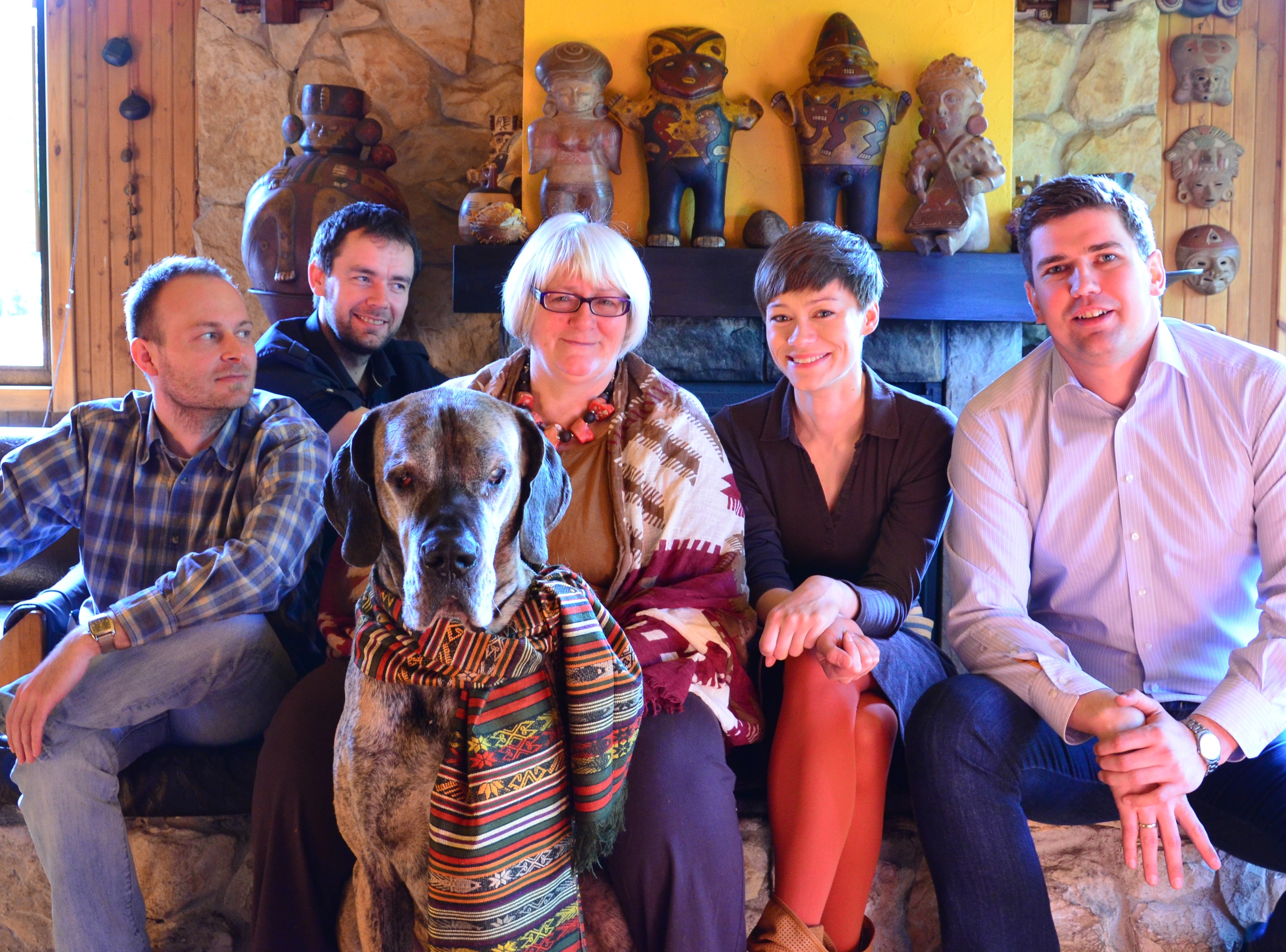 FOT. 2. Prof. Magdalena Śniadecka-Kotarska z zespołem ZSL [Łódź 2014, fot. J. Kotarski].